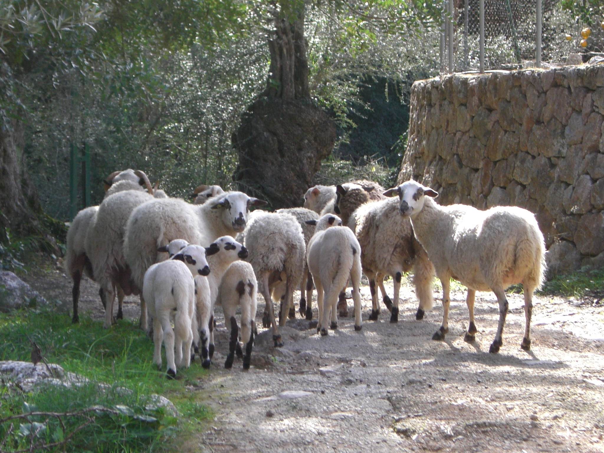 Ovelles de raça no identificada. Fornalutx, Mallorca.